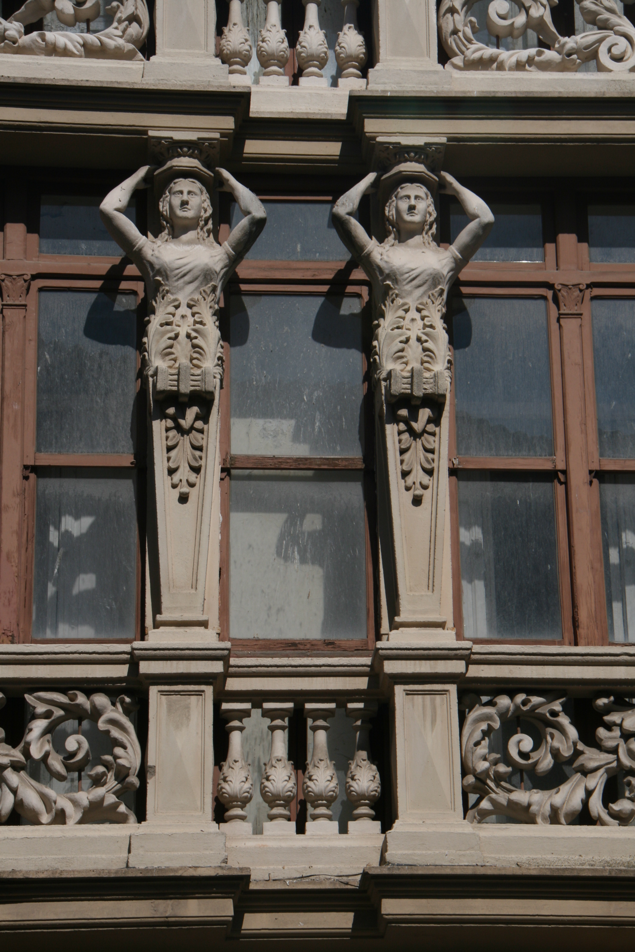 Detalle del Edificio de las Cariátides en la Calle Santa Clara